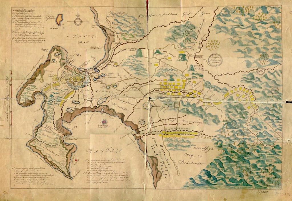 Kaart van die Kaapse nedersetting 1688-1695